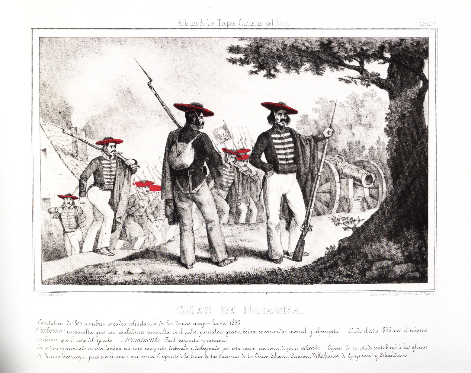 Guías de Navarra. "Albúm de las Tropas Carlistas del Norte". Madrid, sin fecha. (184?)